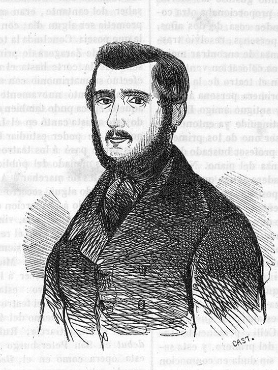 Biografías españolas. Pedro Unanue.